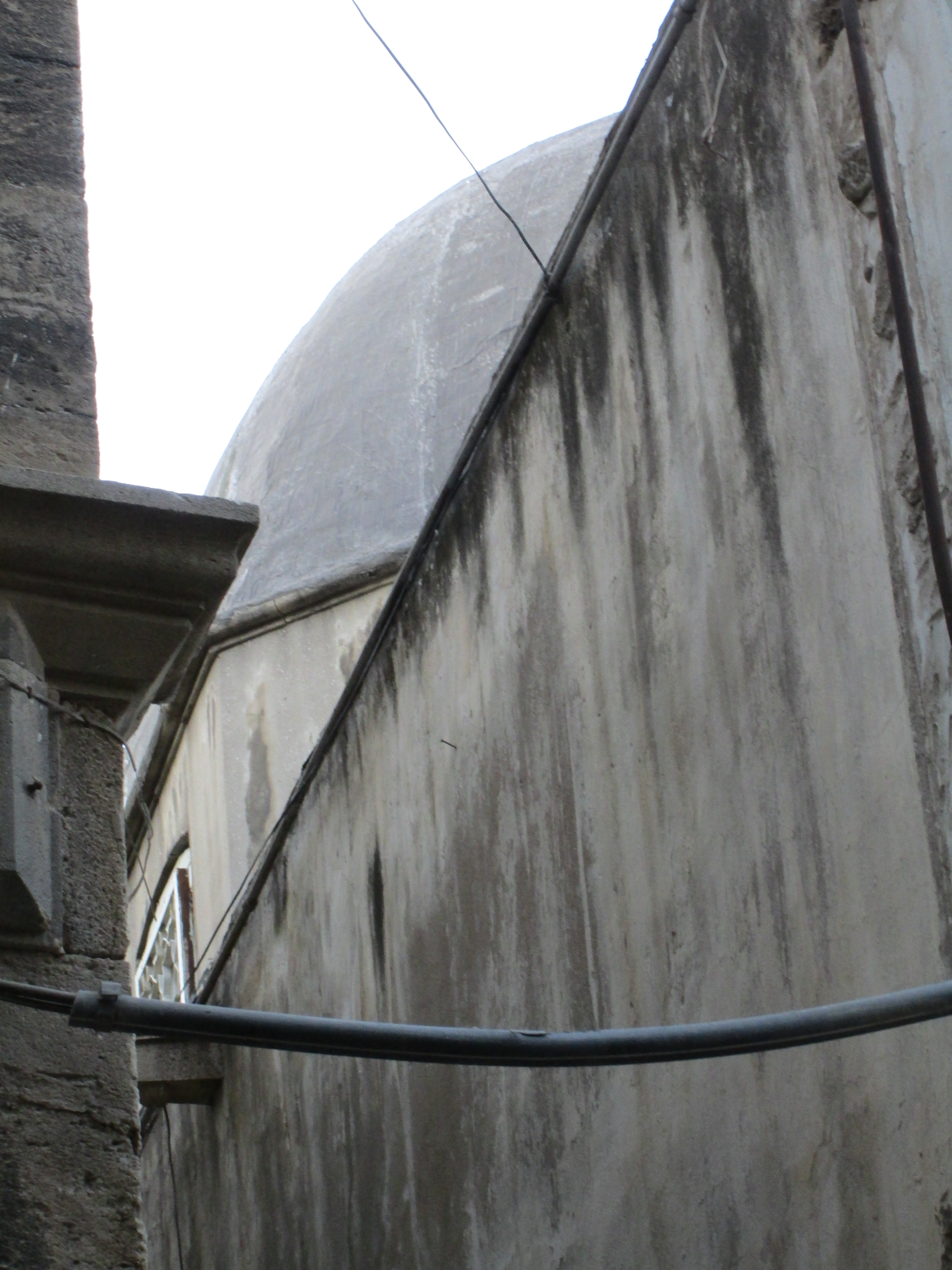 Xanlar məscidinin gümbəzi